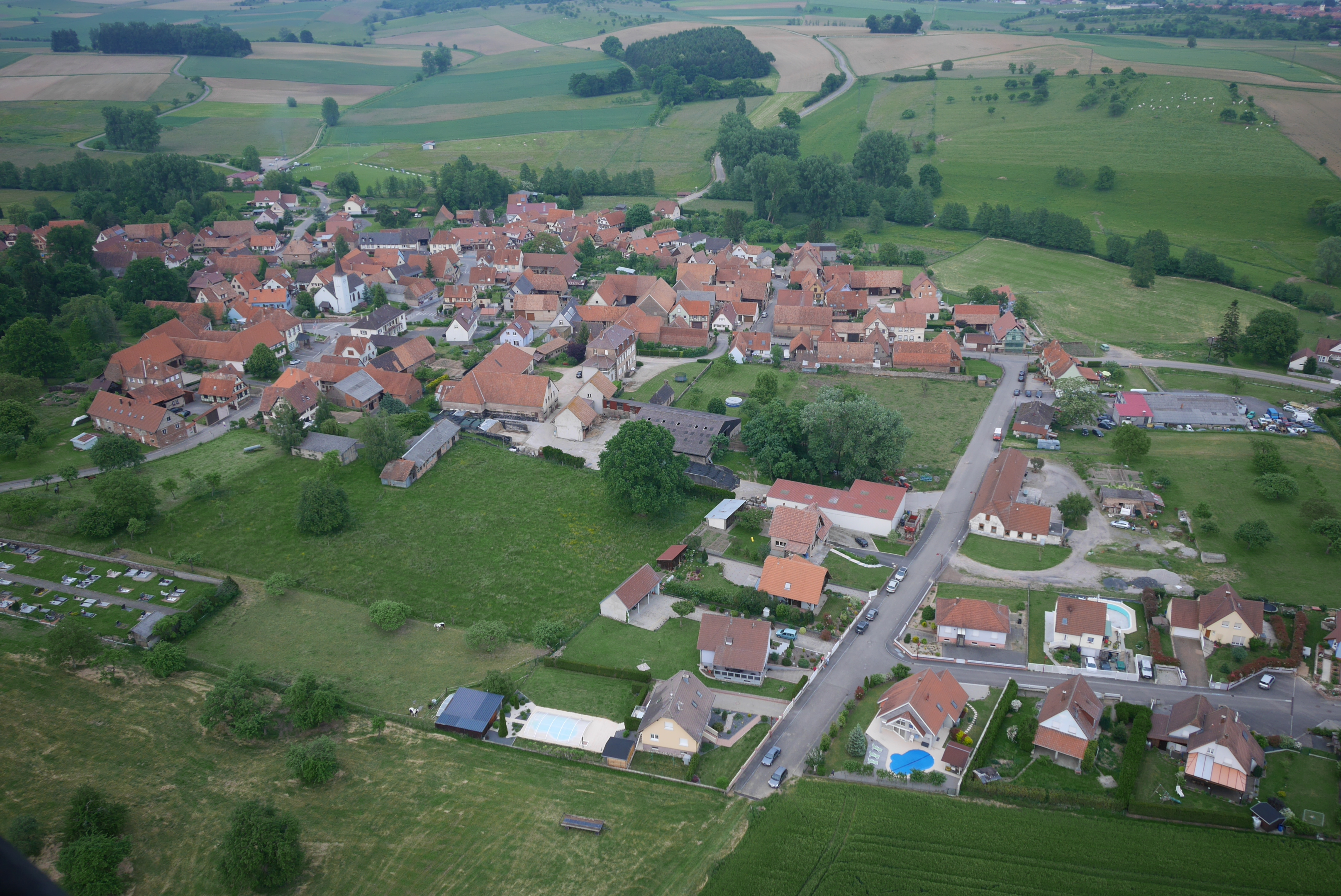 Le village de Mulhausen en Alsace vu depuis une montgolfière